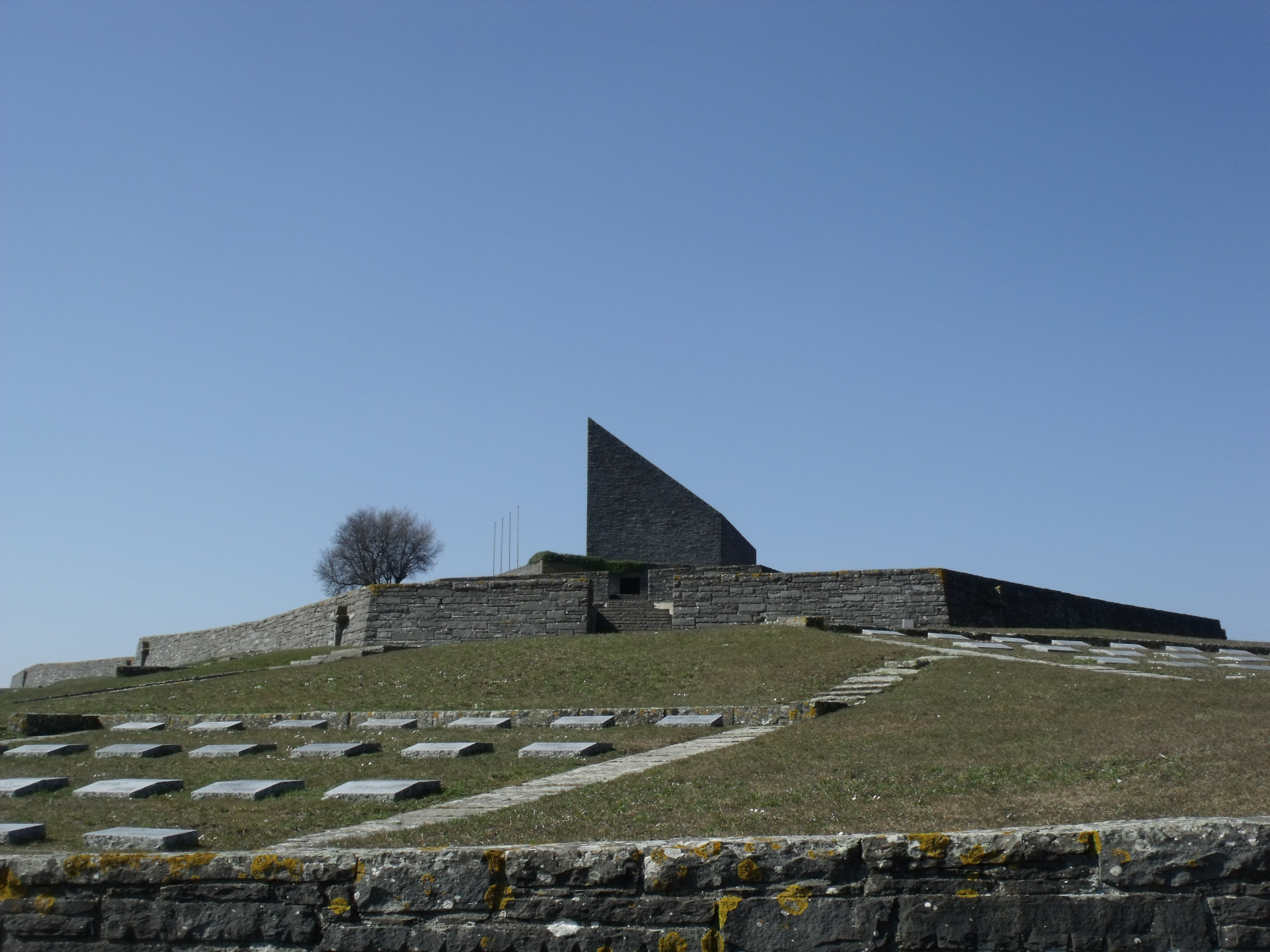 Deutscher Soldatenfriedhof Futapass, Zentralmonument und Gräberfeld, Gemeinde Firenzuola, Mugello, Provinz Florenz, Toskana, Italien